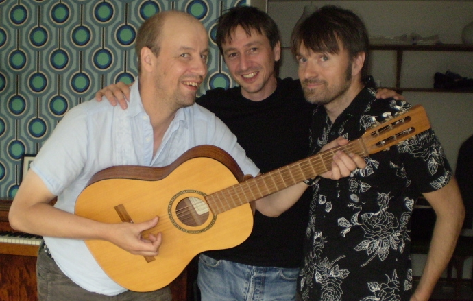 Från vänster, Tor Lundmark, Erik Josefsson, Erik Dahlgren